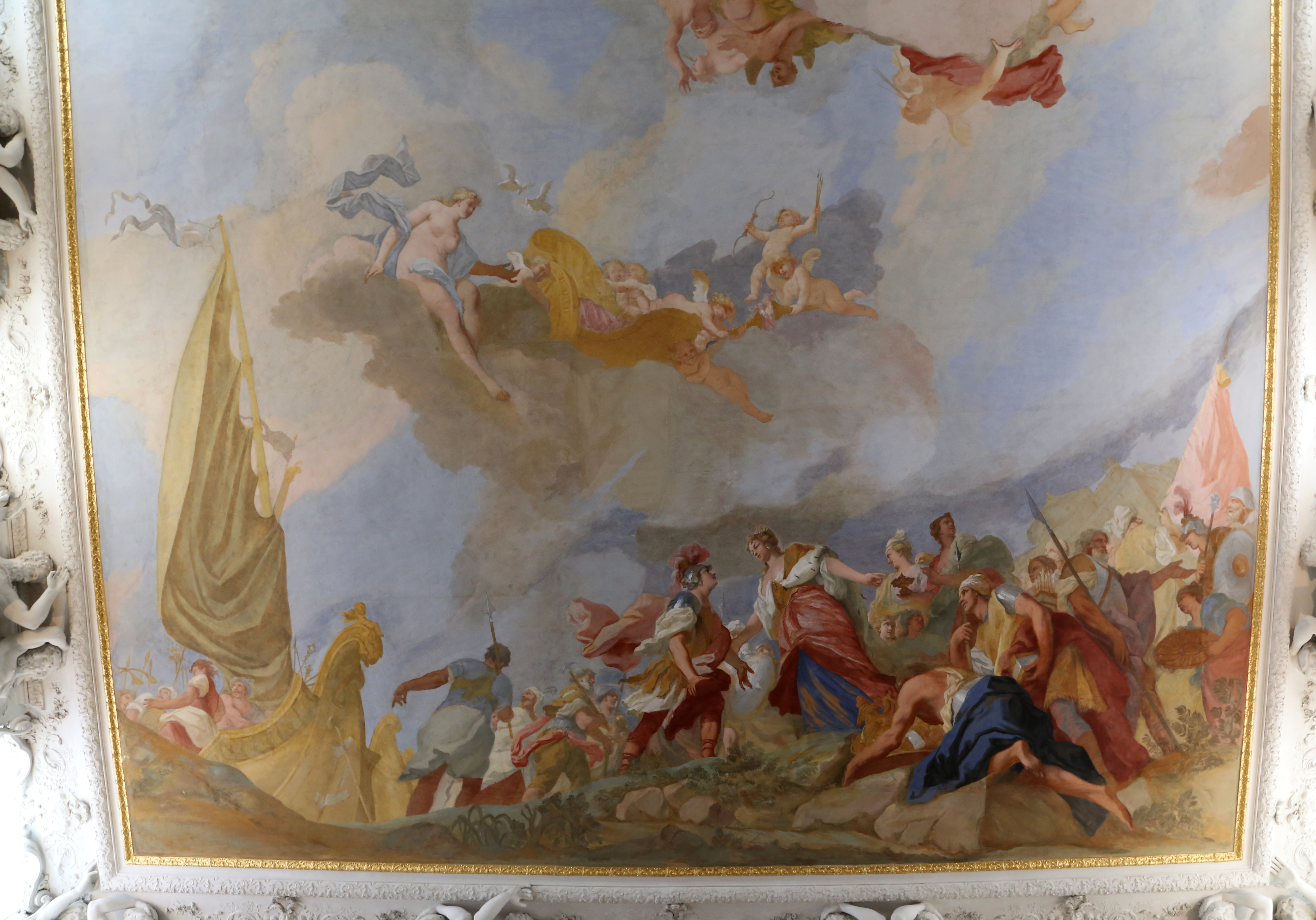 Viktoriensaal, Neues Schloss Schleißheim